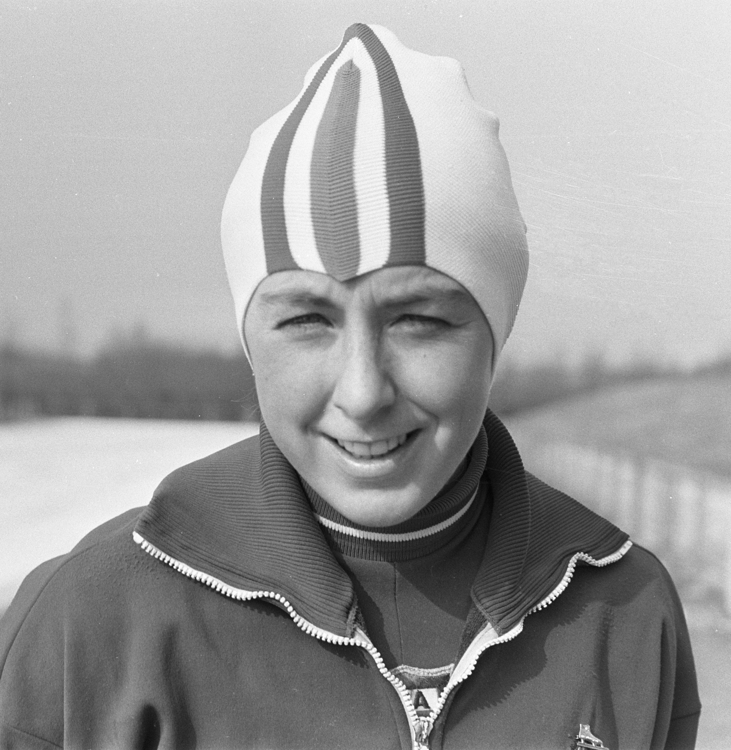 Dianne Holum (VS).